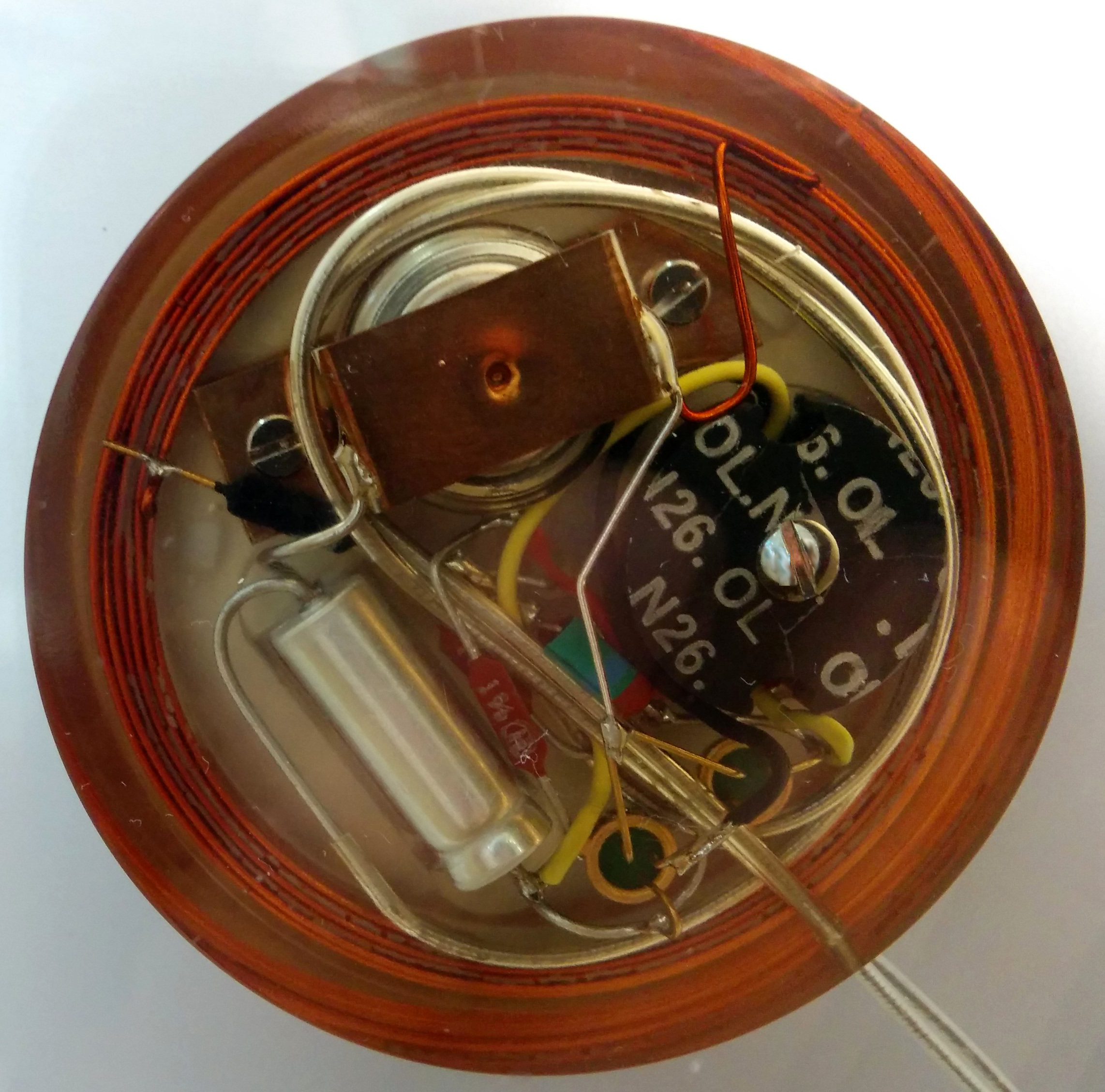 Erster implantierbarer Herzschrittmacher, mit Festfrequenz 70 Hz Hersteller: Siemens-Elema AB, 1958; (Schweden), Objekt: Nachbau aus 1988